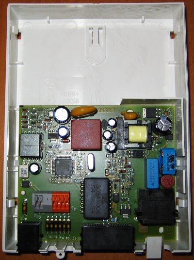 Geöffneter NTBA